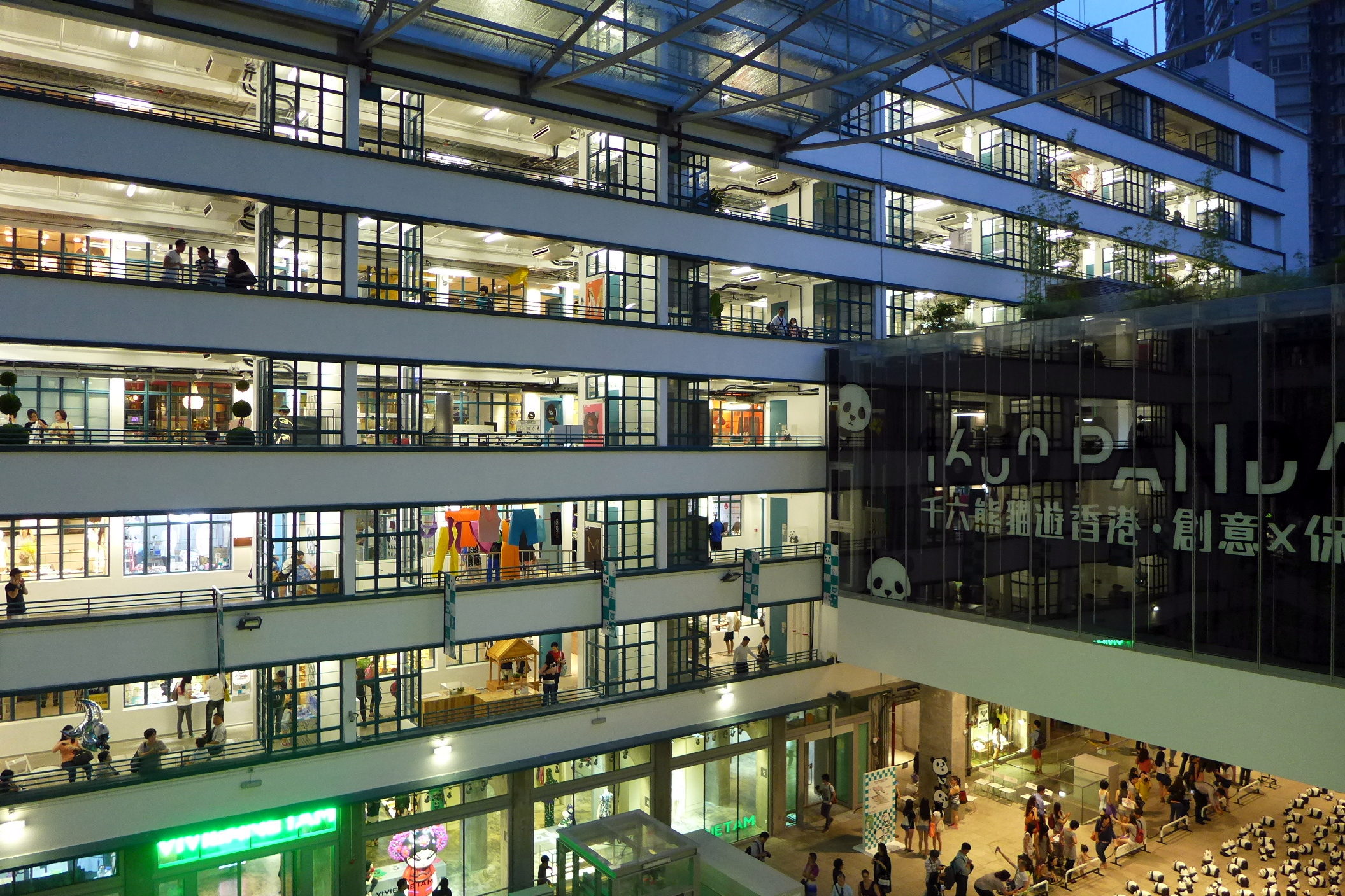 PMQ Night View